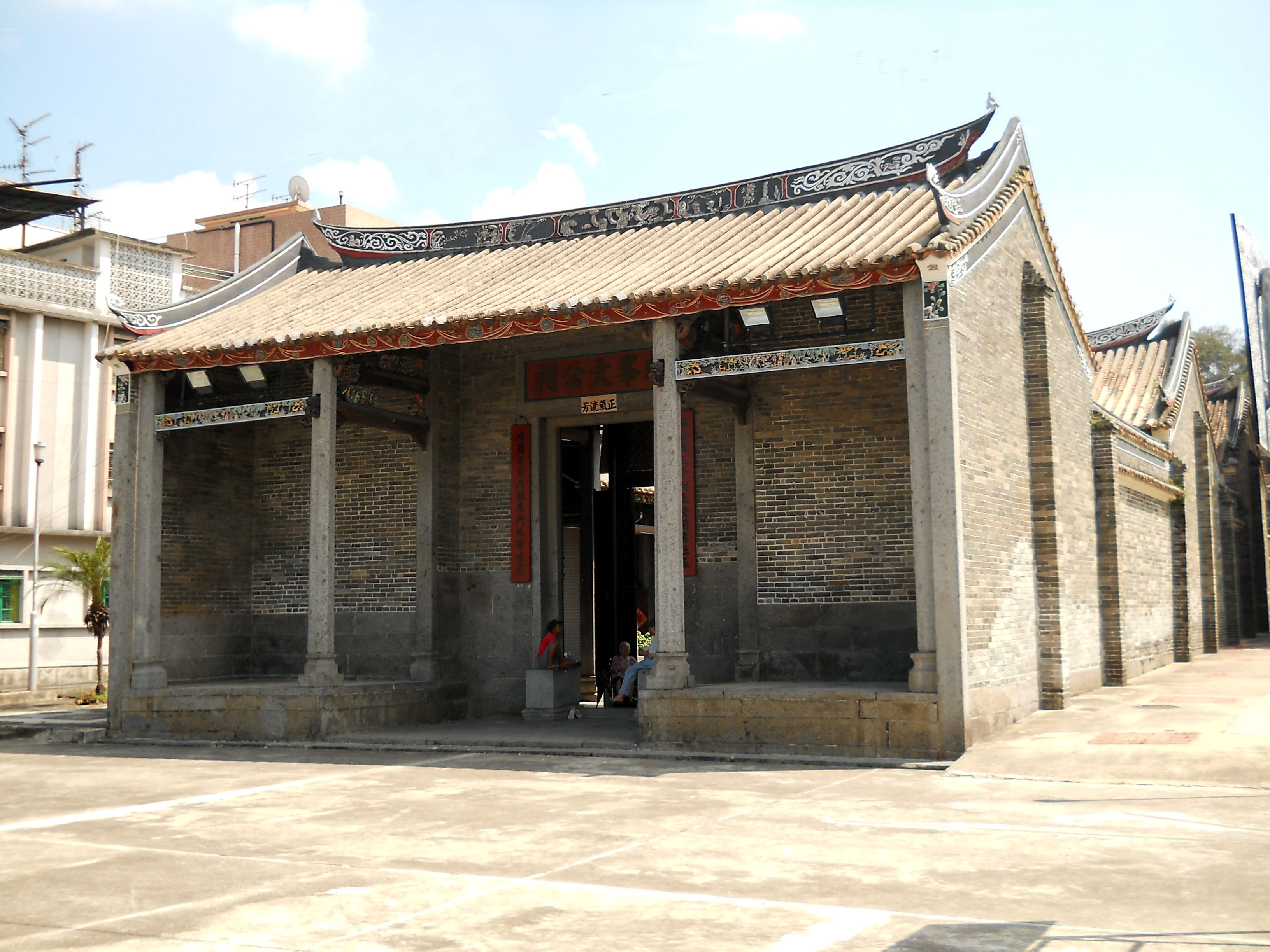 中文（香港）: 麟峯文公祠